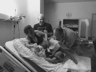 La posición de cuatro puntos ayuda a aliviar el dolor de espalda baja durante las contracciones en una mujer con trabajo de parto avanzado por lo que es muy común para un médico que atiende parto respetado recibir al bebe con la mujer de espaldas y luego buscar pasarlo a su pecho para que inicien el contacto piel a piel madre y bebé.